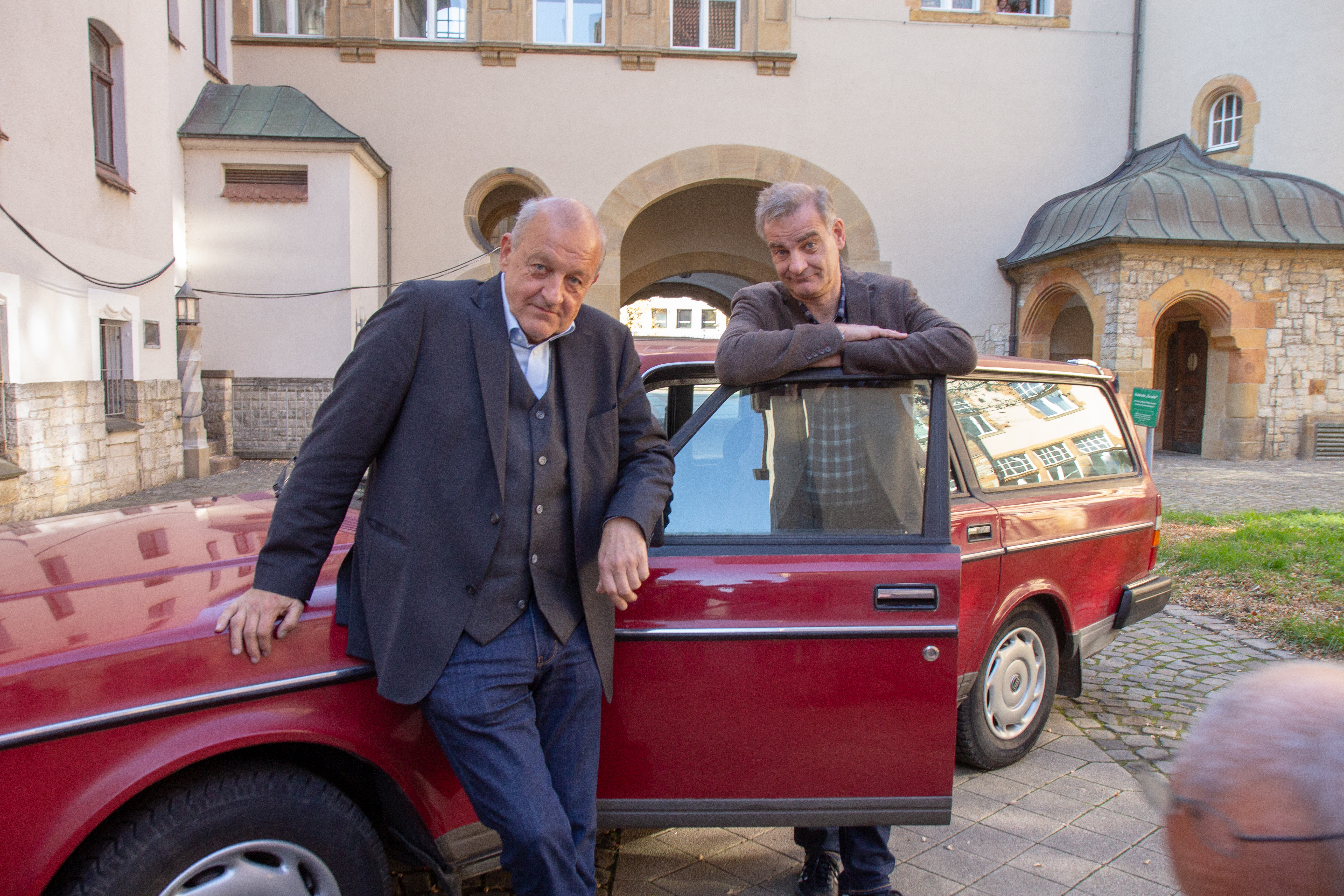 Pressetermin am Set "Wilsberg" am Alten Rathaus in Bielefeld am 15. Oktober 2018. Gruppe: Lansink_Schafmeister; beide am roten Volvo